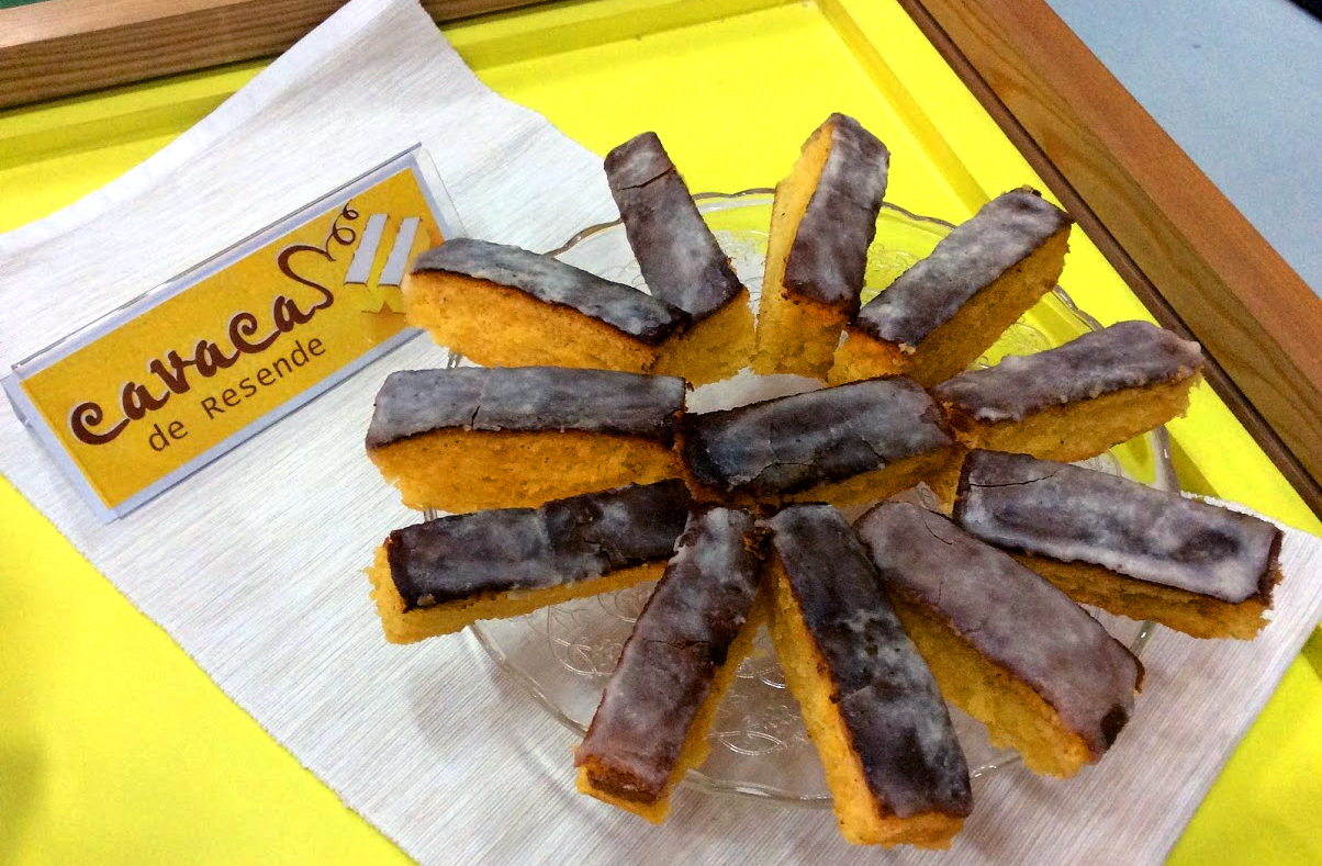 Cavacas, Doçaria Regional